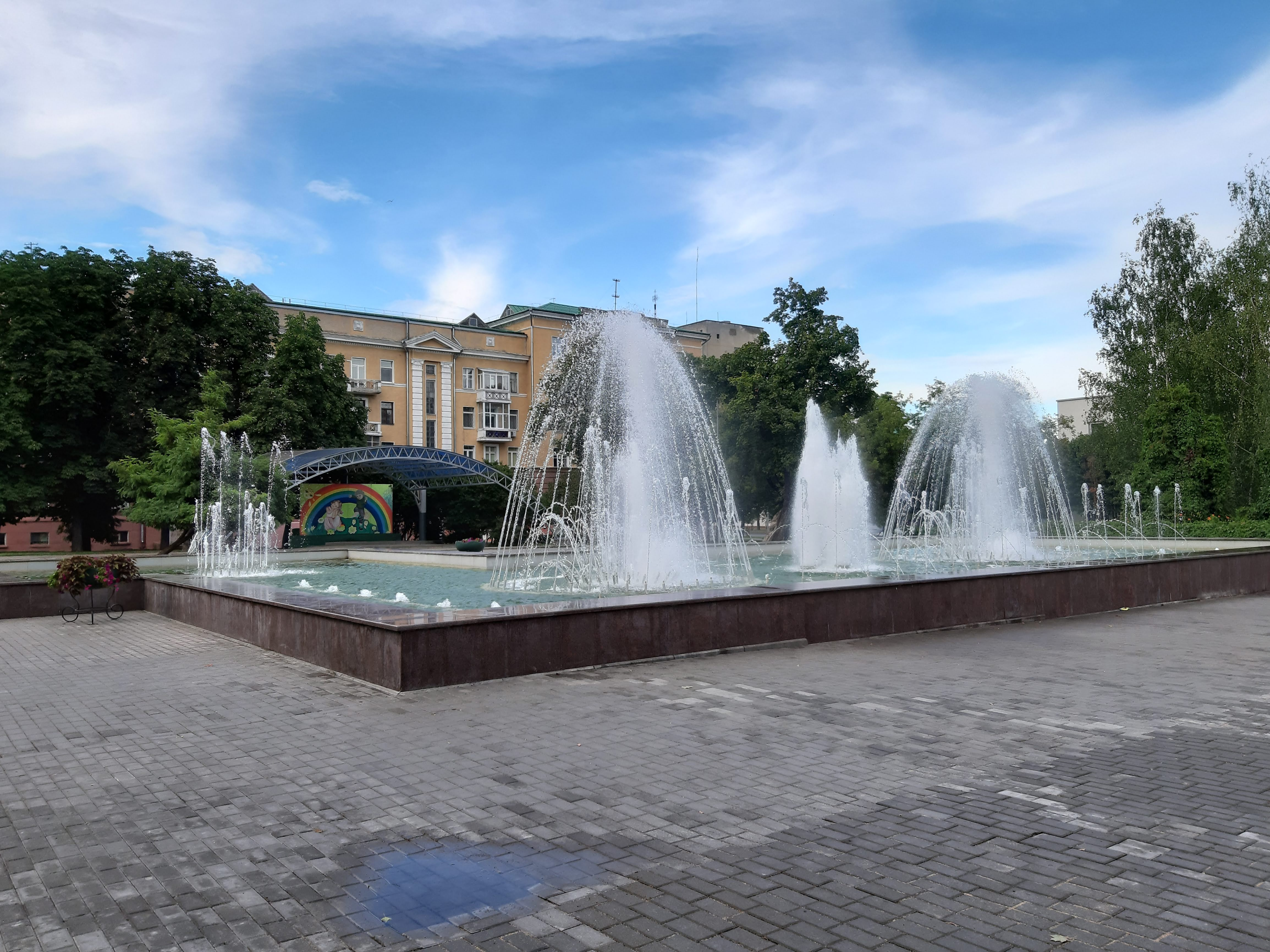 Магілёў. Сквер 40-годдзя з фантанам